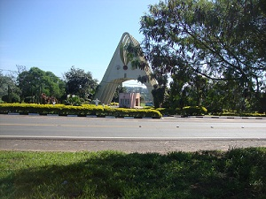 Em Estiva Gerbi SP Brasil encontra-se o Santuário da Nossa Senhora Rosa Mística , local muito visitado por católicos provindos de outras cidades, o local oferece um bom atendimento aos visitantes.